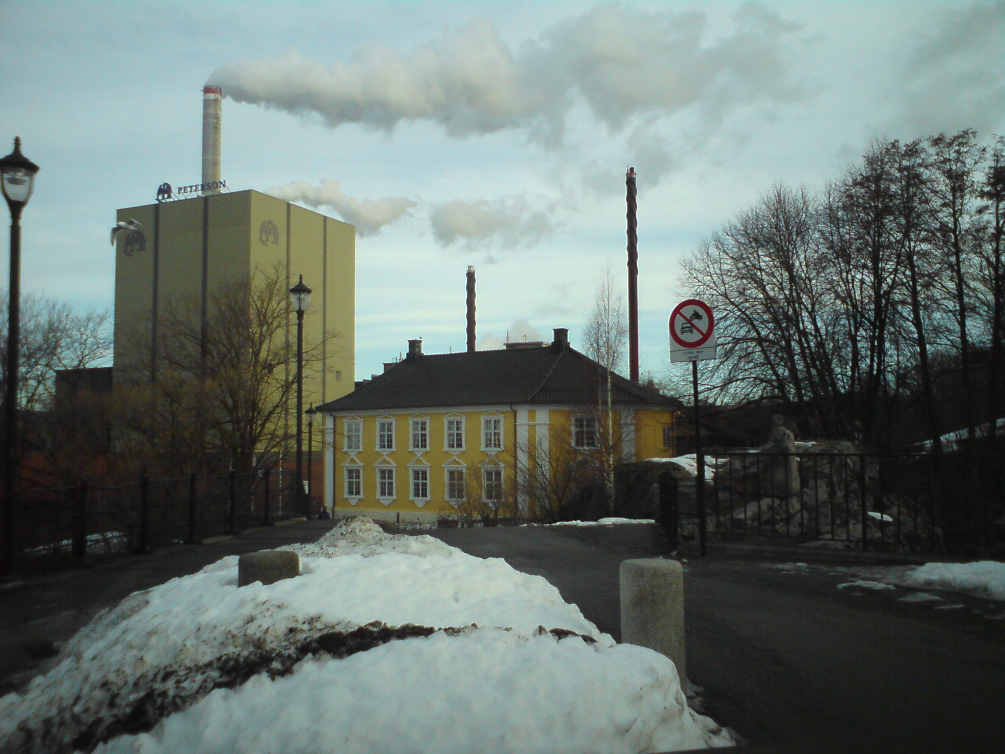 Gamle bygninger i Moss